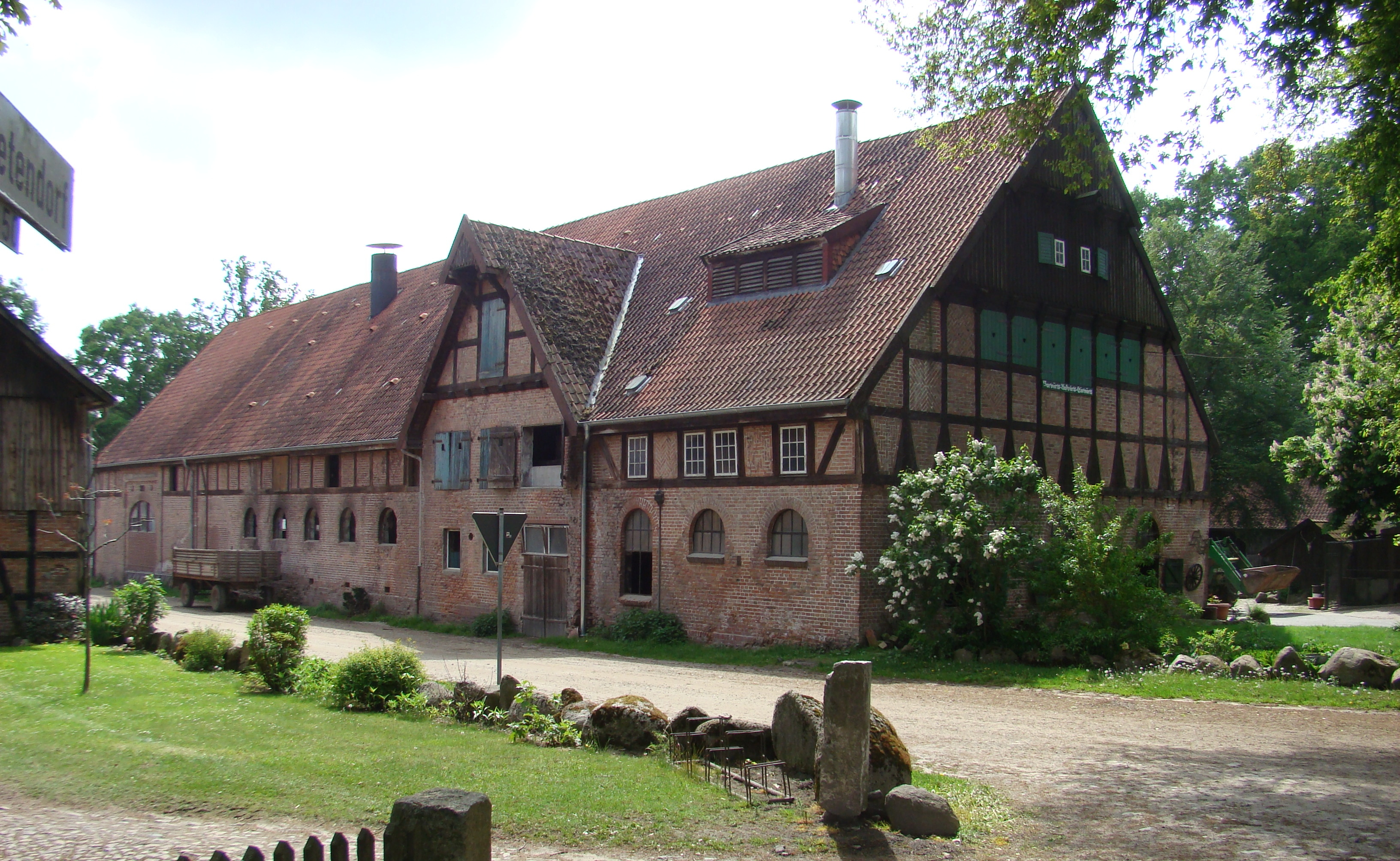 Großer alter Viehstall in Fachwerkbauweise in Hetendorf